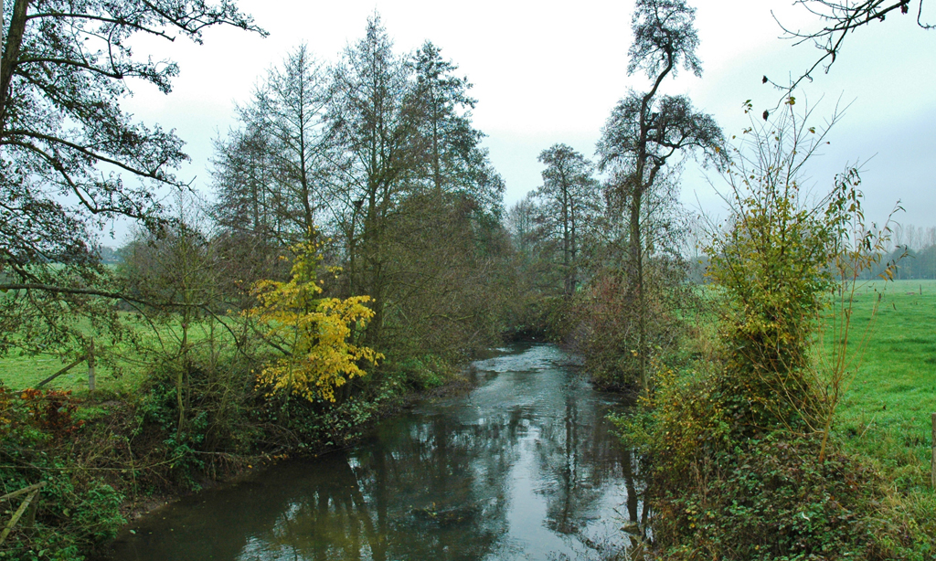 La Béthune à Mesnières-en-Bray